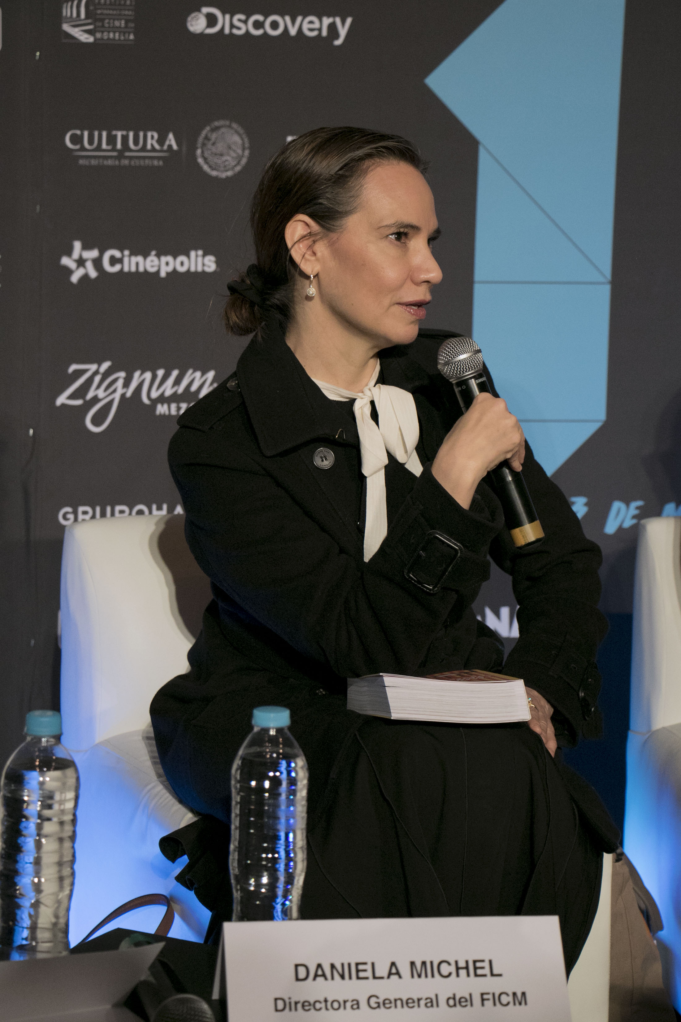 Martes 7 de marzo de 2017. Conferencia de prensa en Cinépolis Diana para anunciar las actividades del Festival Ambulante Gira de Documentales en su decimosegunda edición que se llevará a cabo del 23 de marzo al 6 de abril en la Ciudad de México y del 6 de abril al 25 de mayo en diversas sedes en 9 estados del país, con una programación de 135 títulos de más de 30 países, así como diferentes actividades que complementan esta celebración al cine. Al evento asistieron: Cuauhtémoc Cárdenas (Vicepresidente del FICM), Daniela Michel (Directora general del FICM), Roxana Alejo (Directora Operativa de Ambulante), Paulina Suárez (Directora General de Ambulante), Meghan Monsour (Directora de programación de Ambulante), Ramón Ramírez (Director de Relaciones Públicas de Cinépolis) y una representante de Zignum (patrocinador del festival). Fotografía: Tania Victoria / Secretaría de Cultura CDMX.